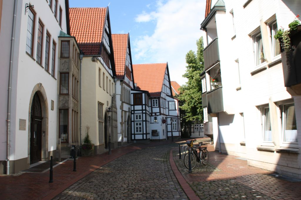 In der Altstadt von Minden